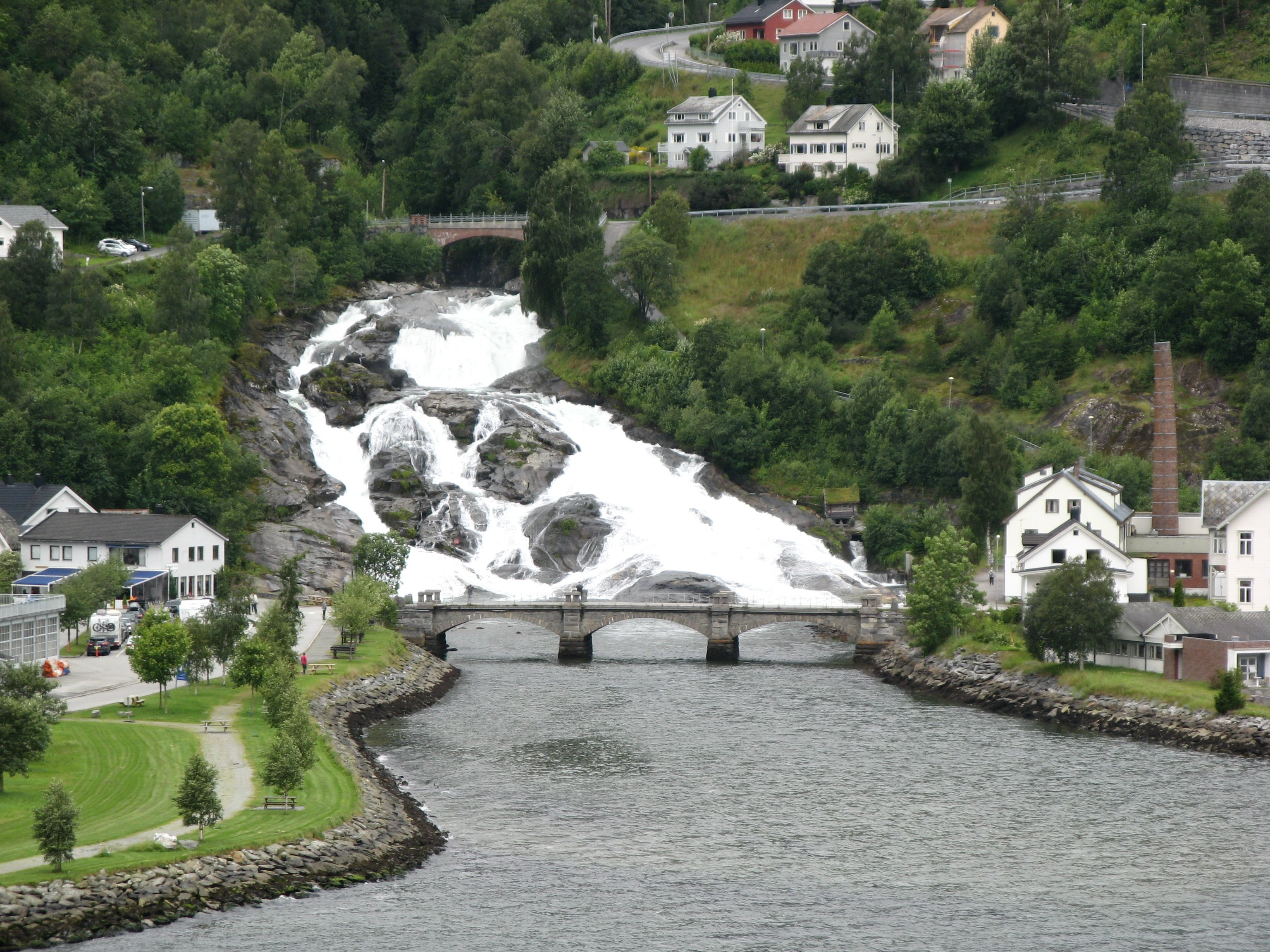 Hellesylt